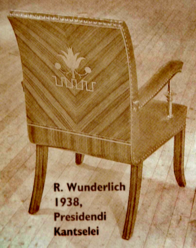 tool